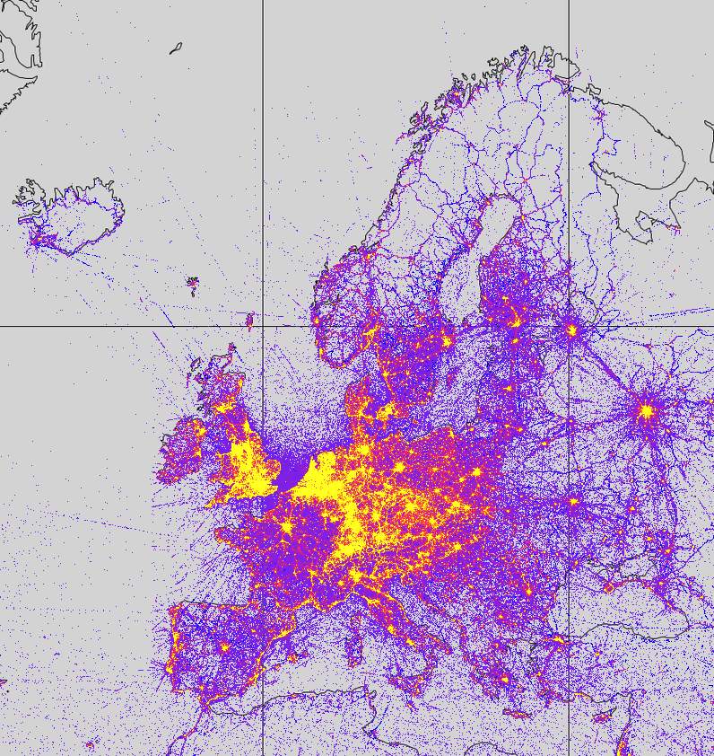 WiGLE erzeugt täglich eine Karte wo der gesamte Datenstand an WLAN Netzwerken gezeigt wird. Dieses Bild ist ein Ausschnitt von Europa dieser Karte des 7 November 2019.